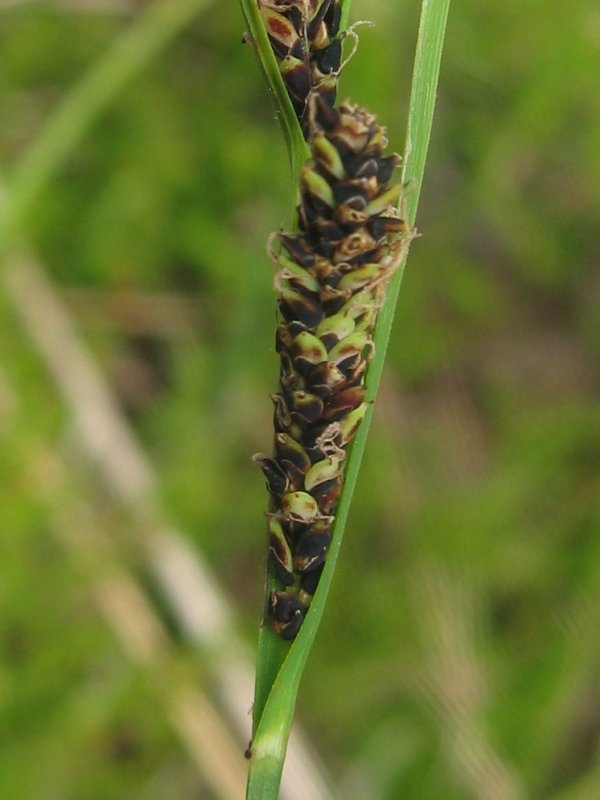 Braune Segge Carex nigra, weiblicher Teilblütenstand, Zingst